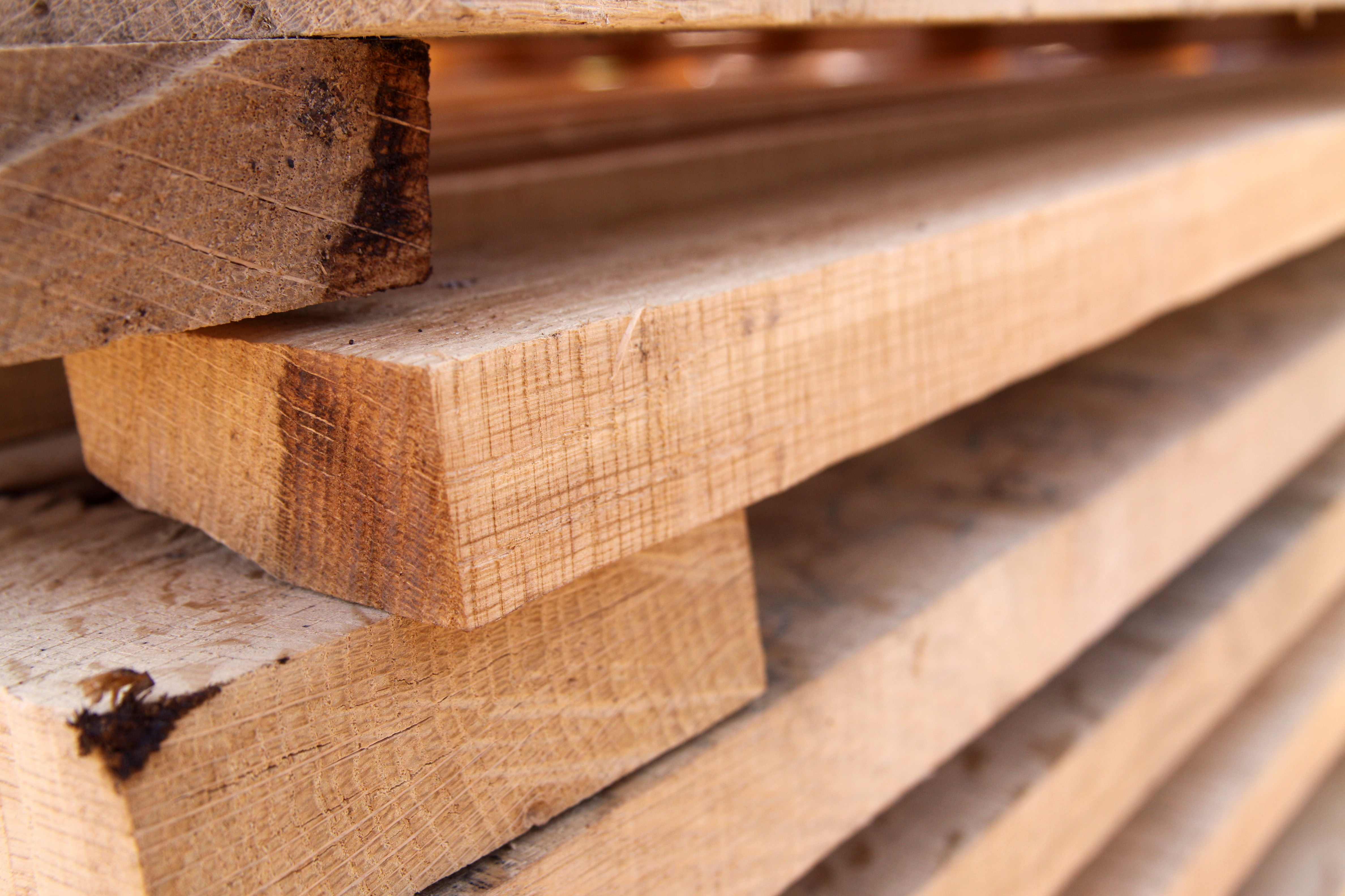 Douelles découpées attendant le séchage